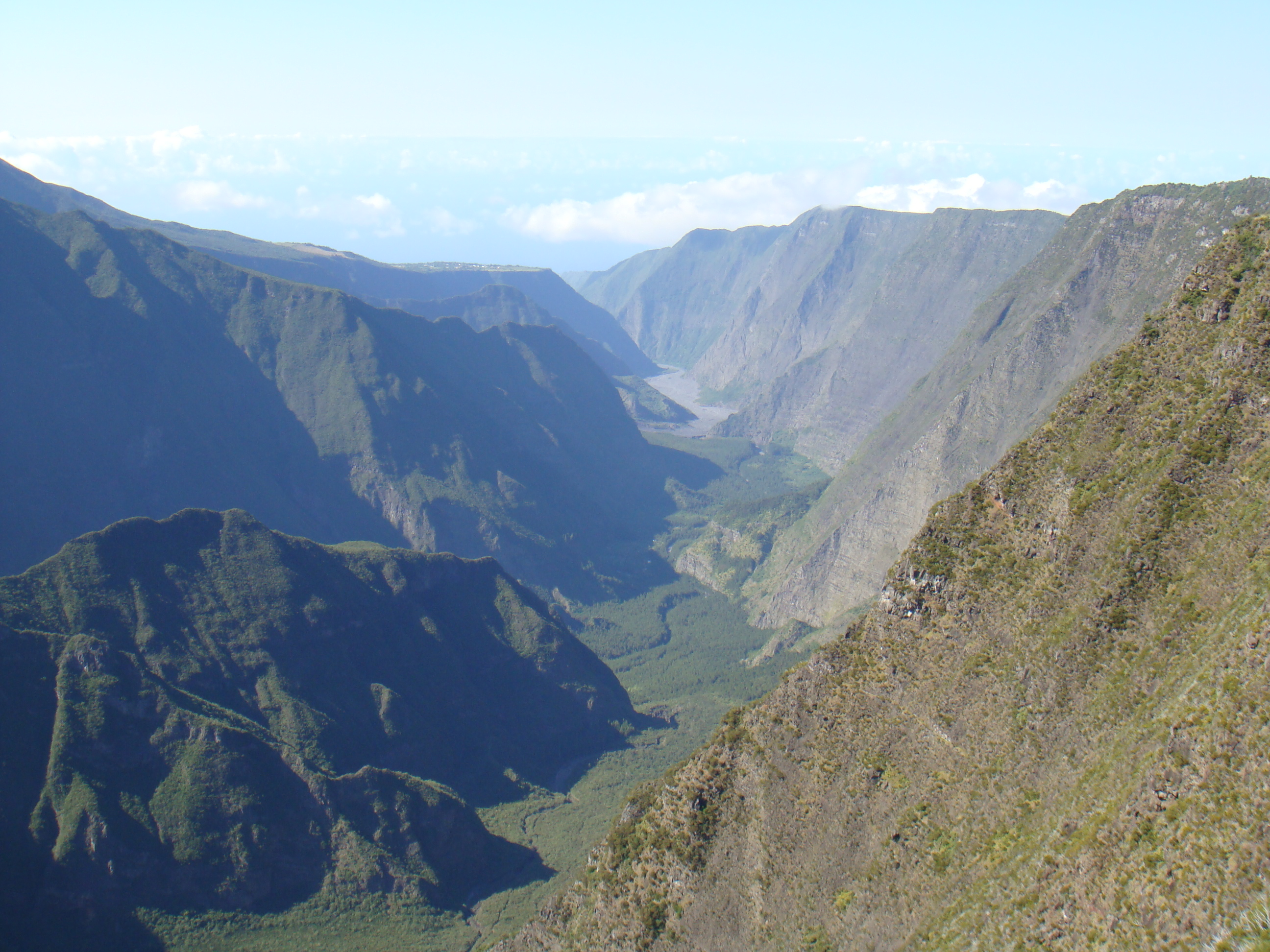 Rivière des Remparts